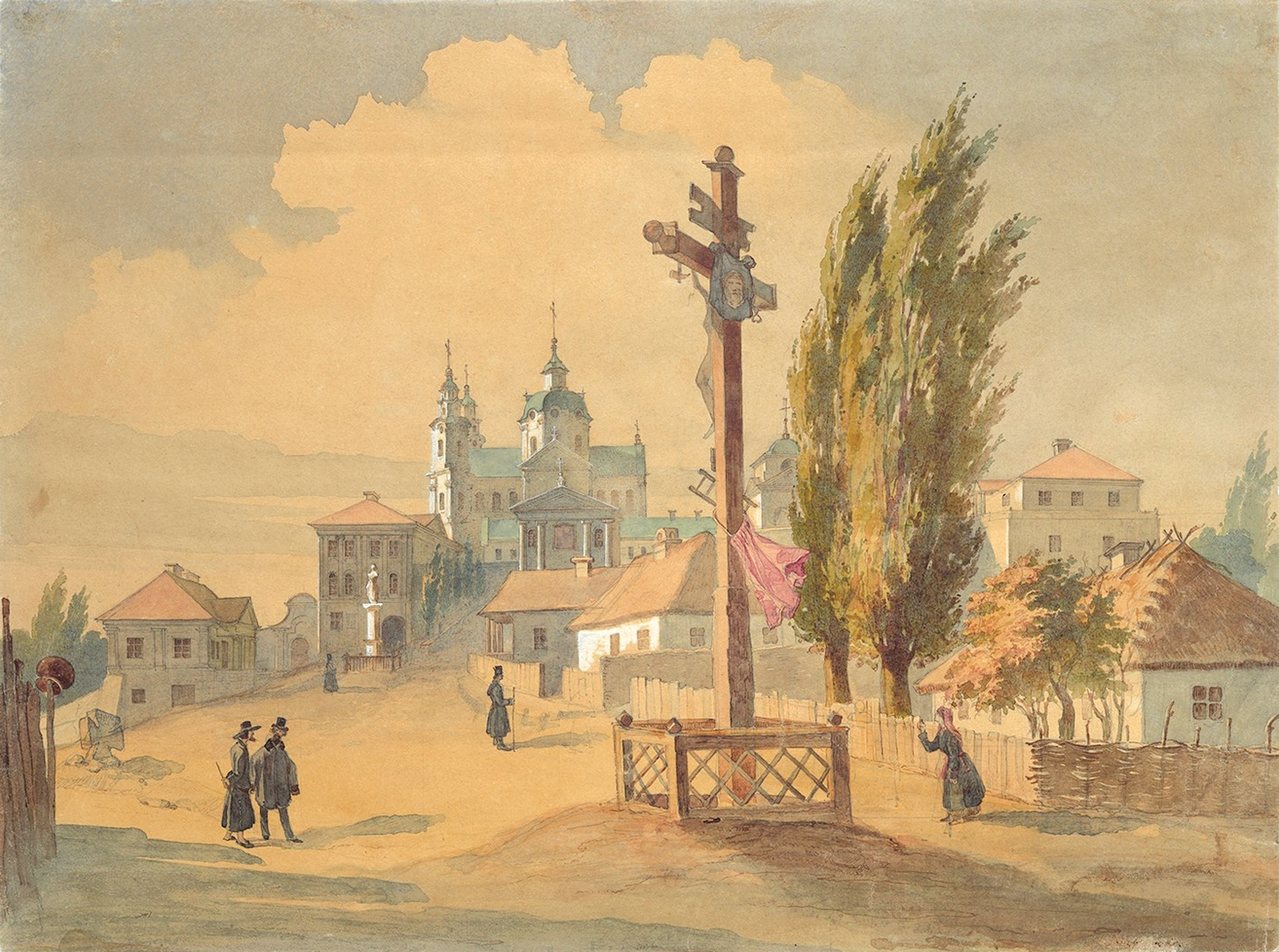 Тарас Шевченко. Почаївська лавра зі сходу. Акварель. 10–20 жовтня 1846